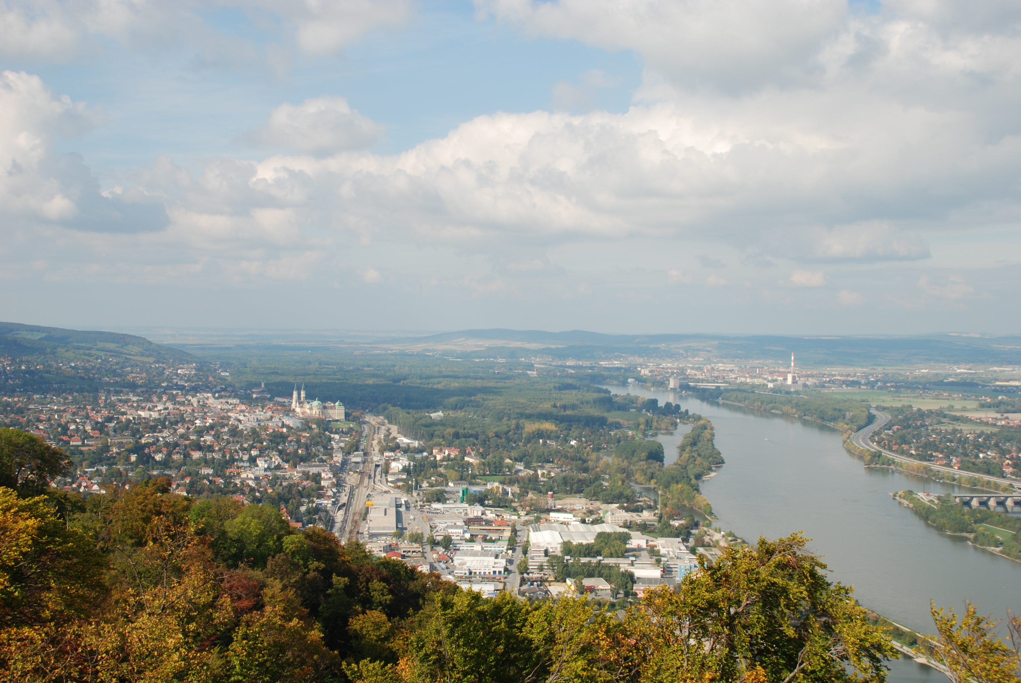 Das Nordwestliche Umland vom Leopoldsberg, mit Klosterneuburg und Korneuburg über der Donau. Fototour vom 7.10.2007.